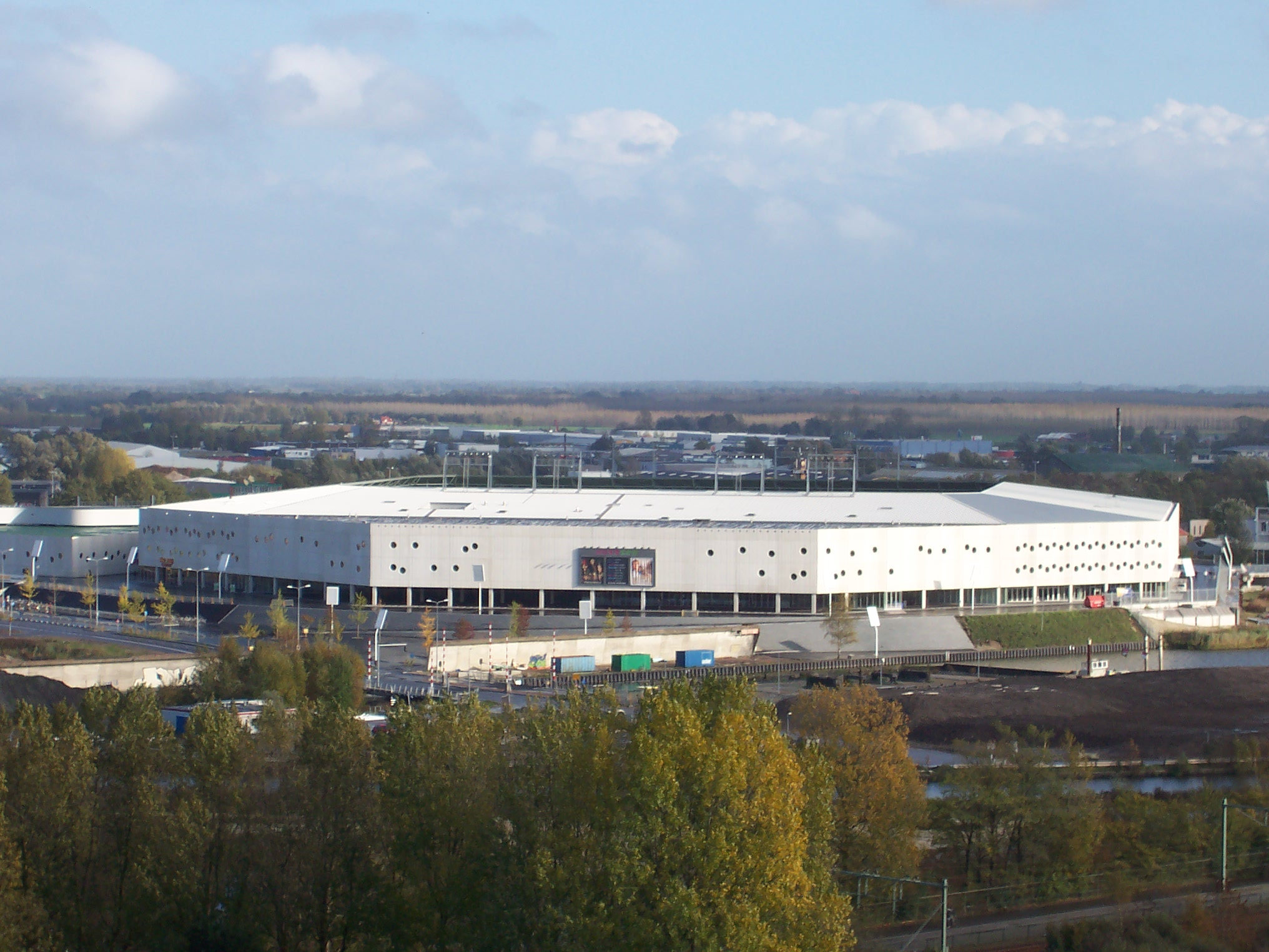 Groningen, Voetbalstadion Euroborg in vogelvlucht